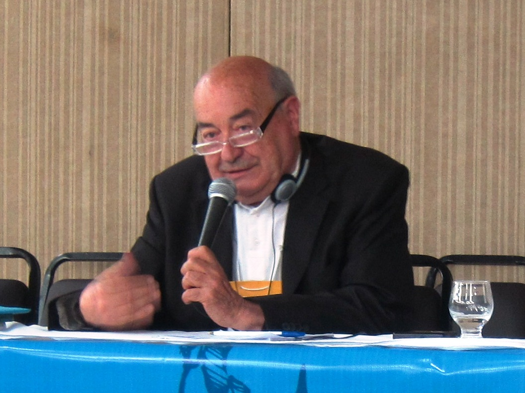 Il prof. Marco Dezzi Bardeschi mentre tiene una keynote lecture al convegno ArquiMemòria4 a Salvador de Bahia in Brasile